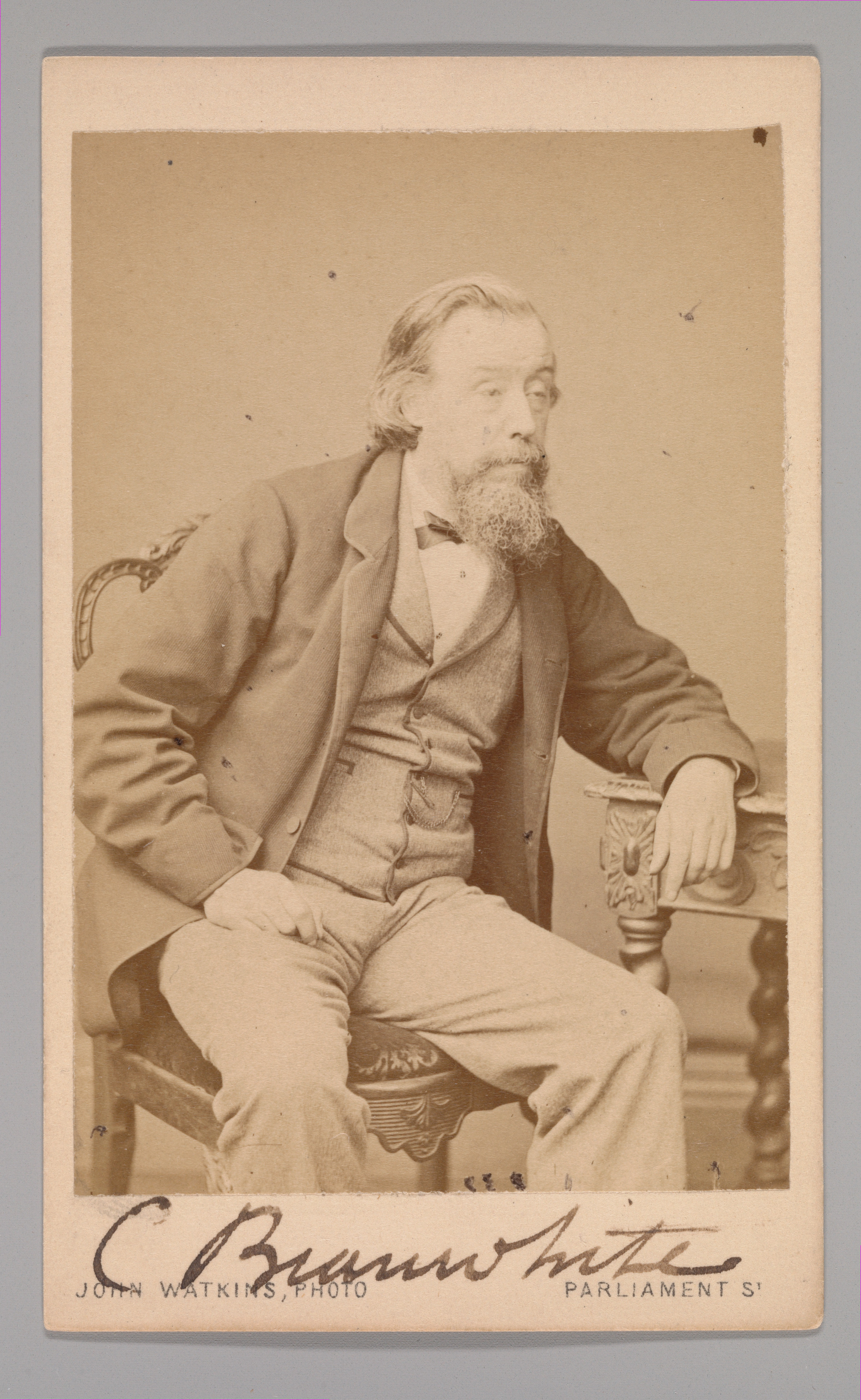 Carte-de-visite; Photographs